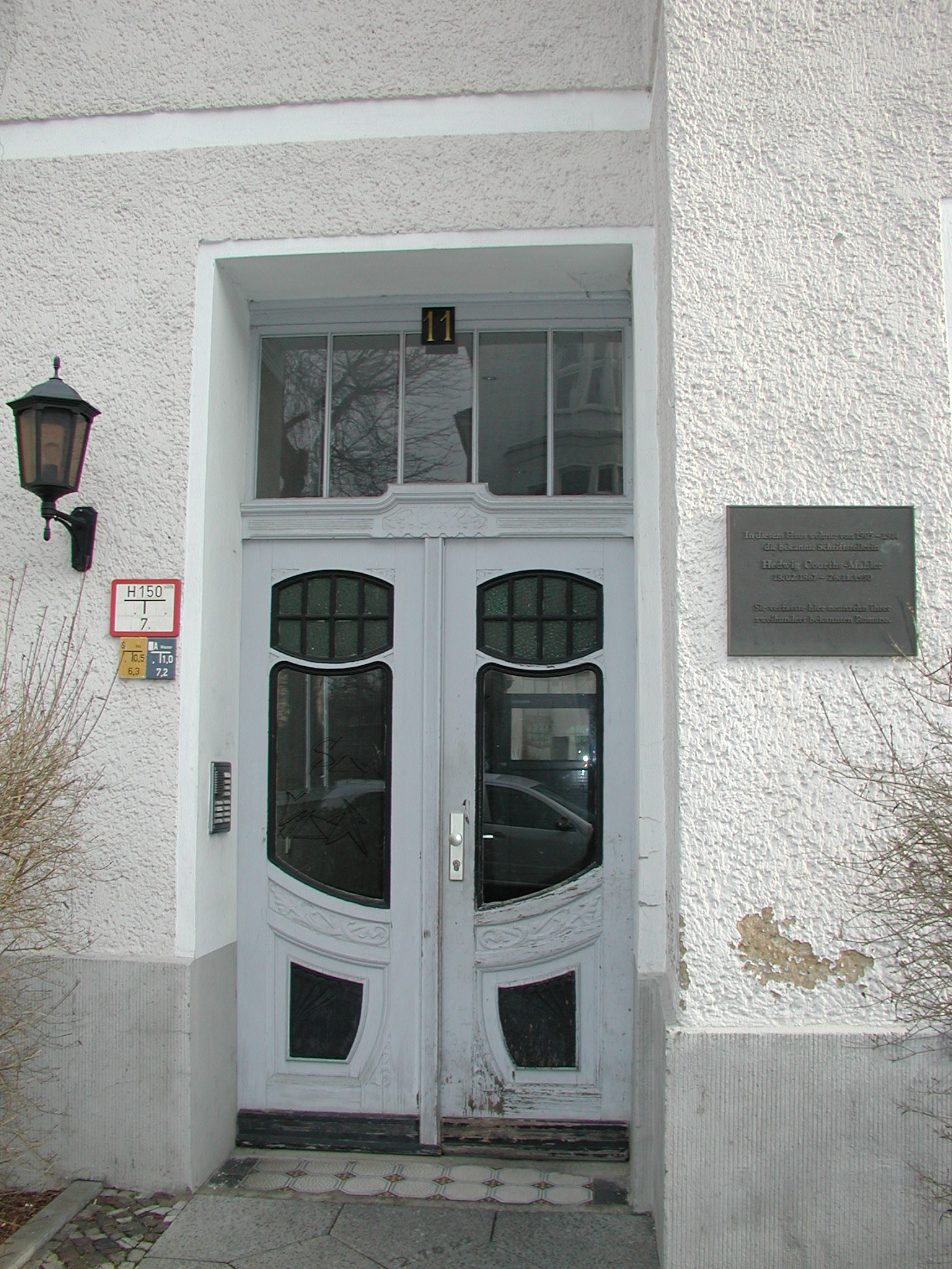 Eingang zum Wohnhaus von H. Courths-Mahler